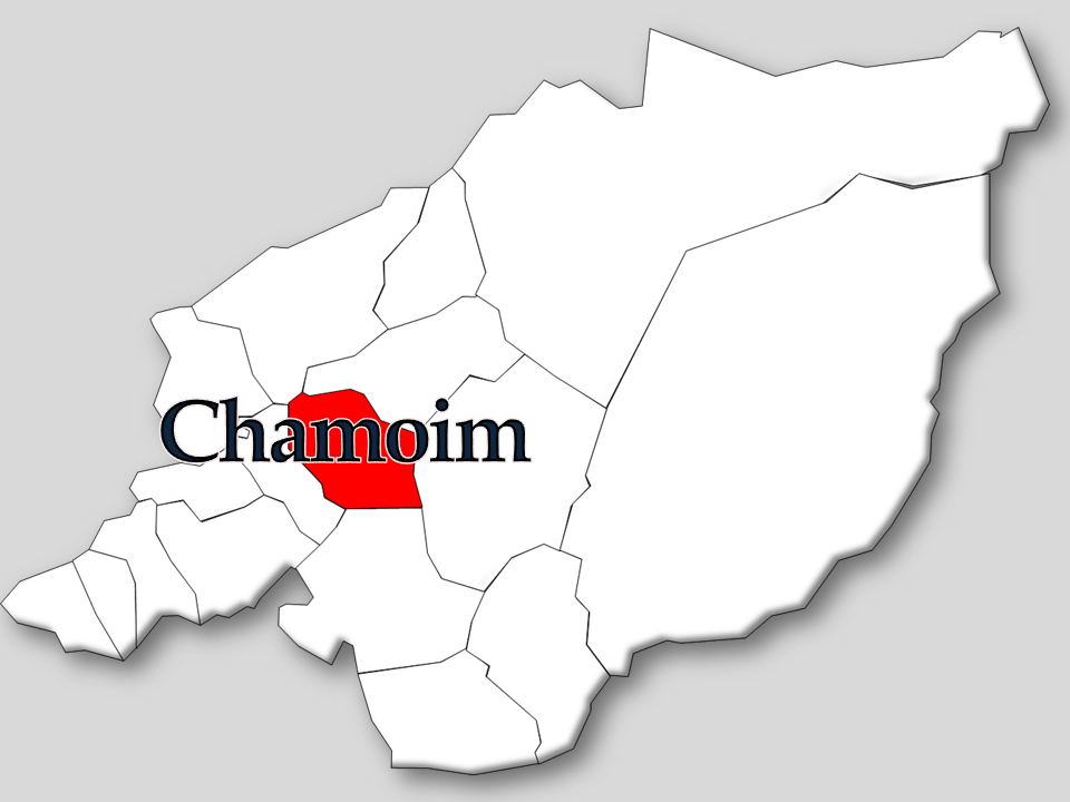 Censos 1864/2011